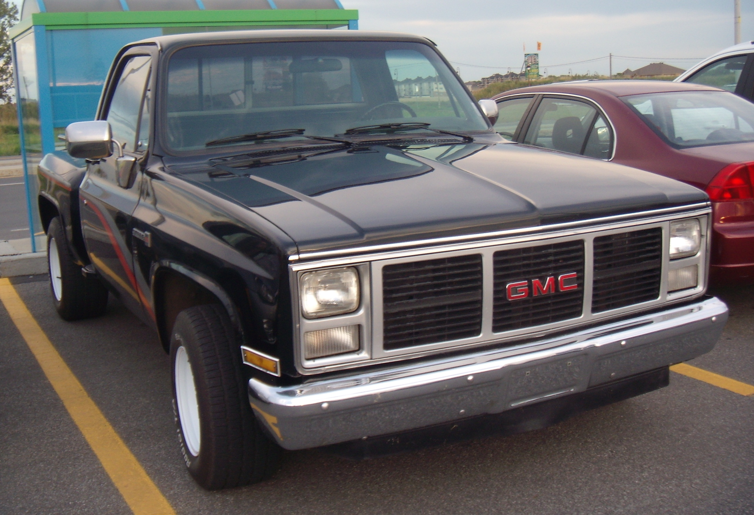 1985-1987 GMC C/K photographed in Vaudreuil-Dorion, Quebec, Canada at the Auto classique Bellepros Vaudreuil-Dorion.